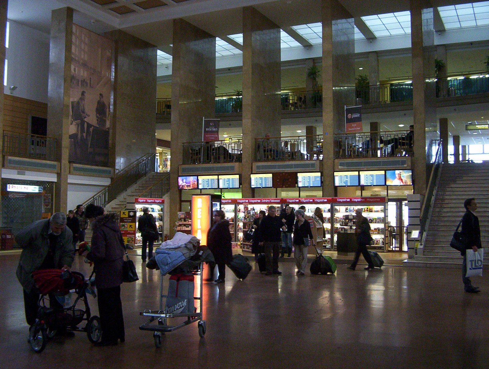 A Liszt Ferenc Repülőtér 1-es termináljának várócsarnoka a bejárat felől, jobb oldalról